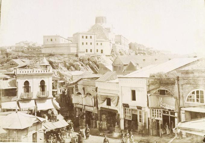 Tiflis: Tatar bazaar.